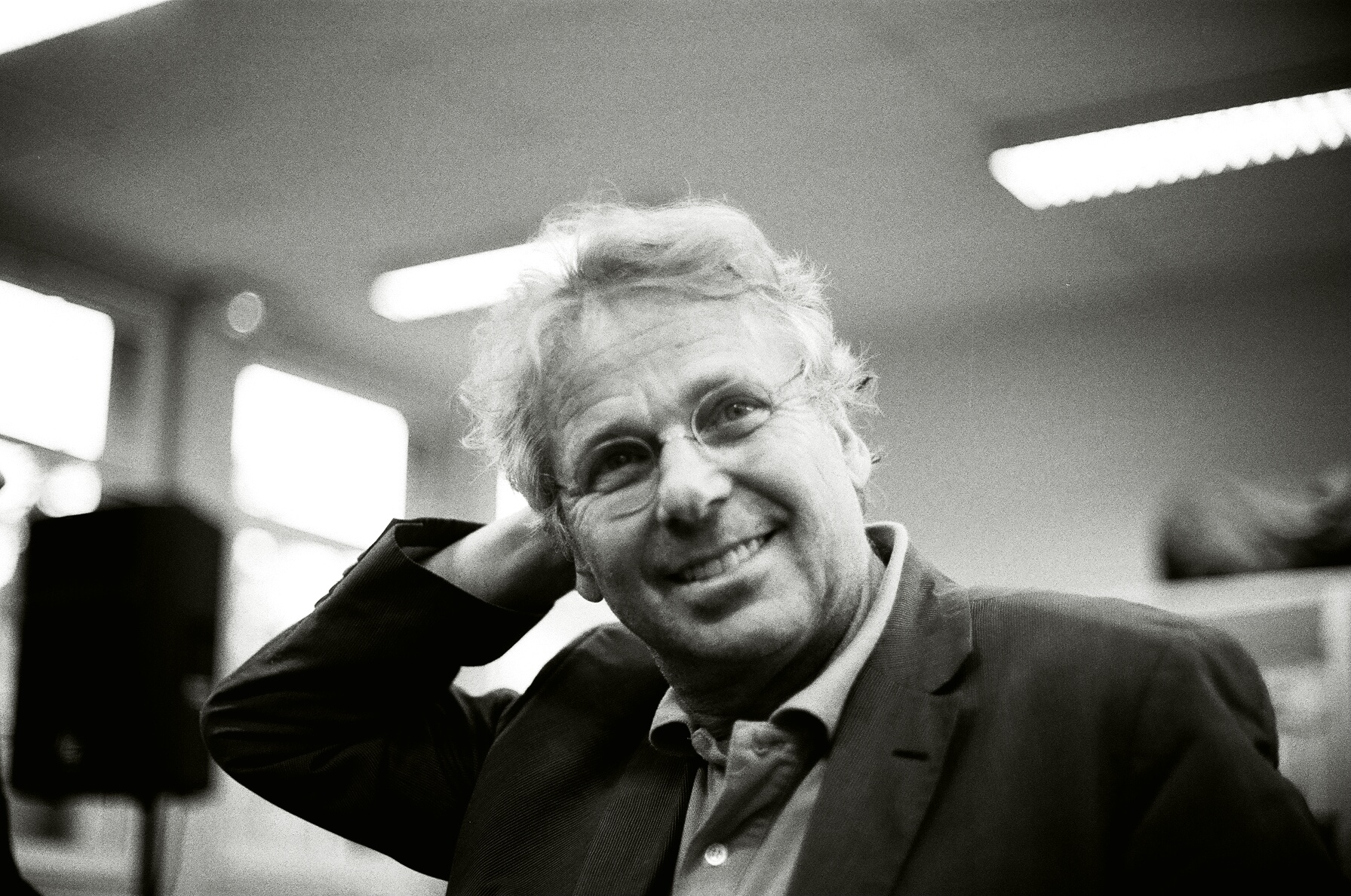 Daniel Cohn-Bendit